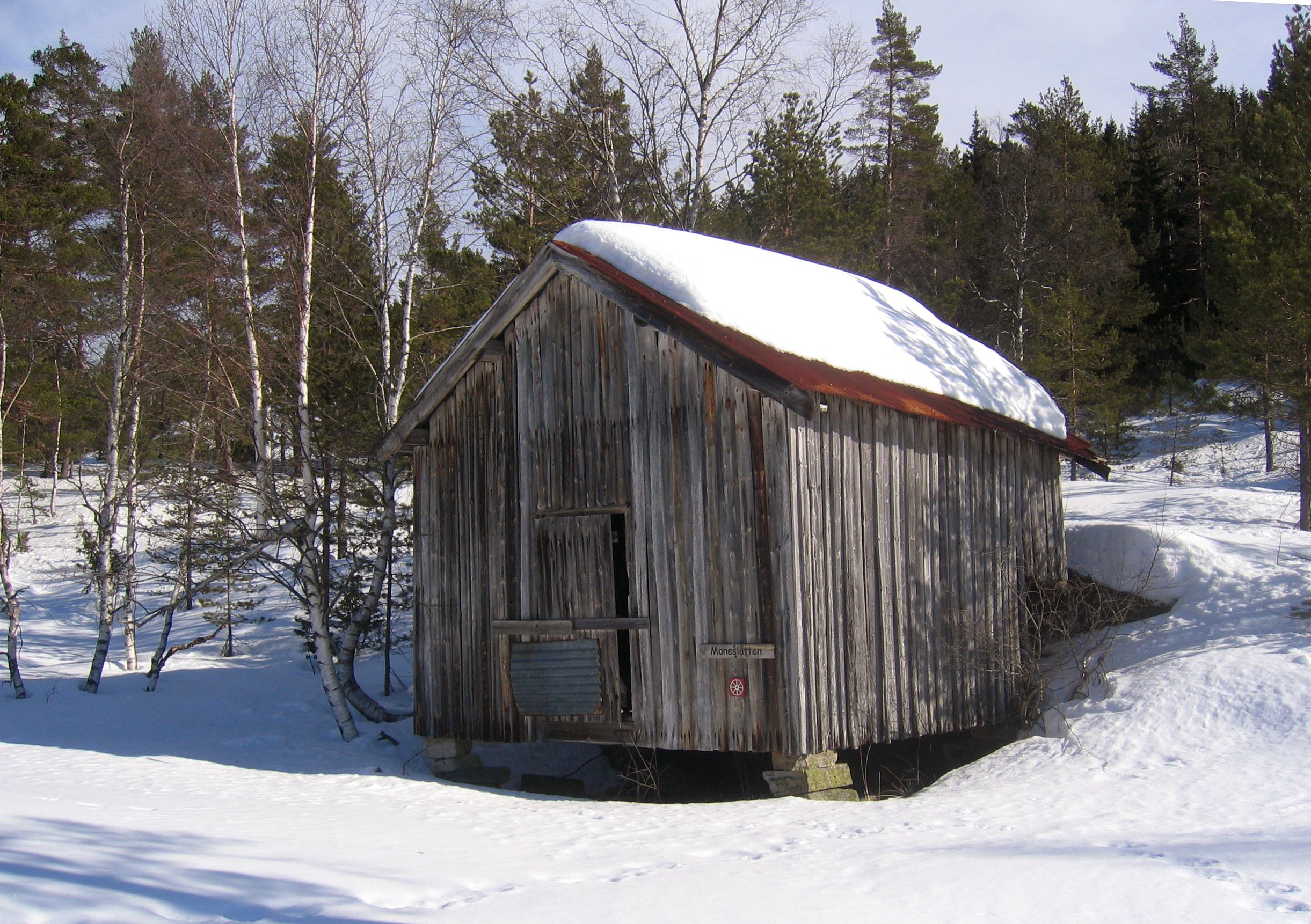 Uteløpe på Moneslåtten på Øynaheia.